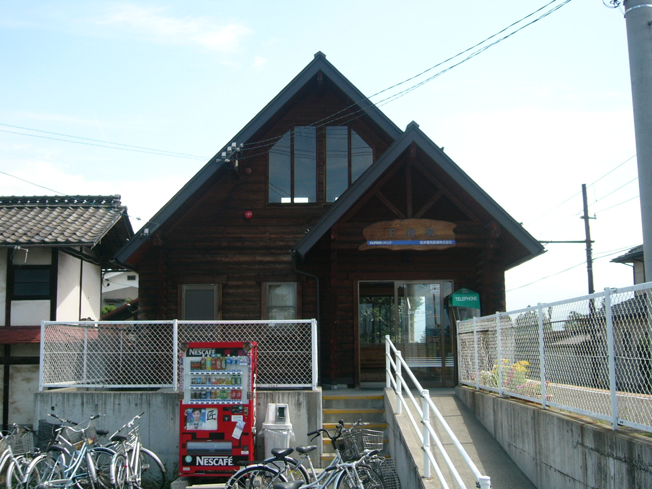 Shimonii Station